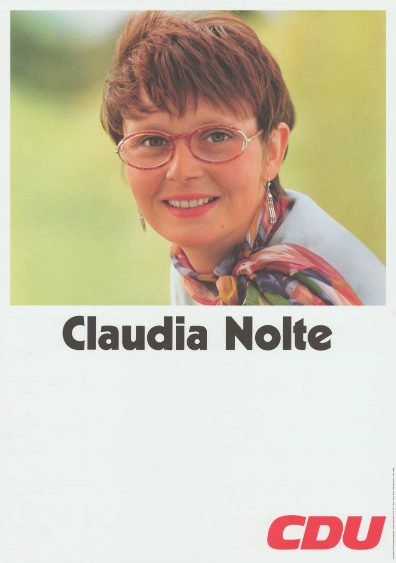 Claudia Nolte CDU Abbildung: Porträtfoto Plakatart: Kandidaten-/Personenplakat mit Porträt Auftraggeber: CDU-Bundesgeschäftsstelle, Bonn Drucker_Druckart_Druckort: Greven & Bechtold GmbH Objekt-Signatur: 10-031 : 823 Bestand: CDU-Plakate (10-031) GliederungBestand10-18: Personenplakate Lizenz: KAS/ACDP 10-031 : 823 CC-BY-SA 3.0 DE